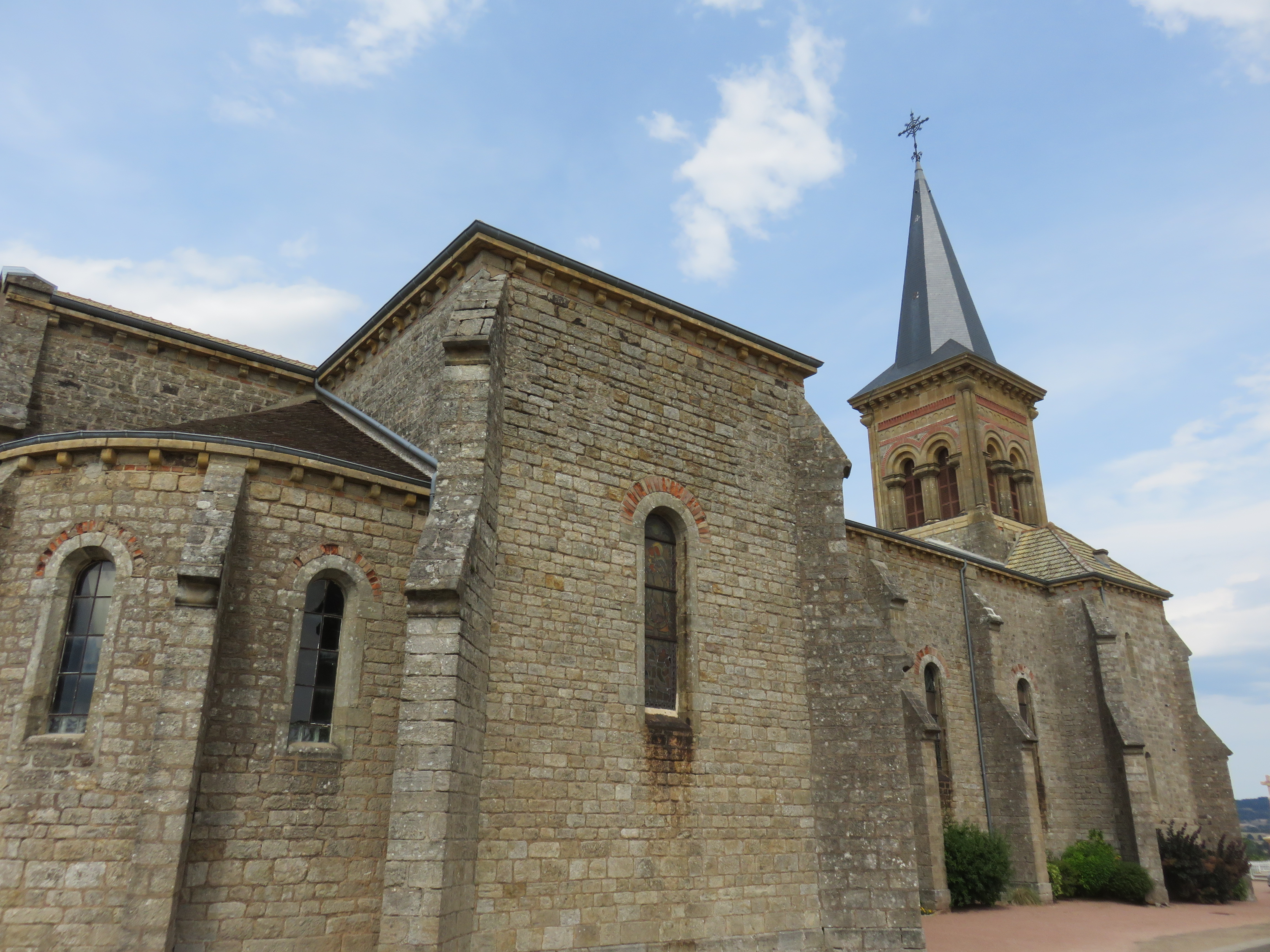 Église de Dyo (Saône-et-Loire, France).